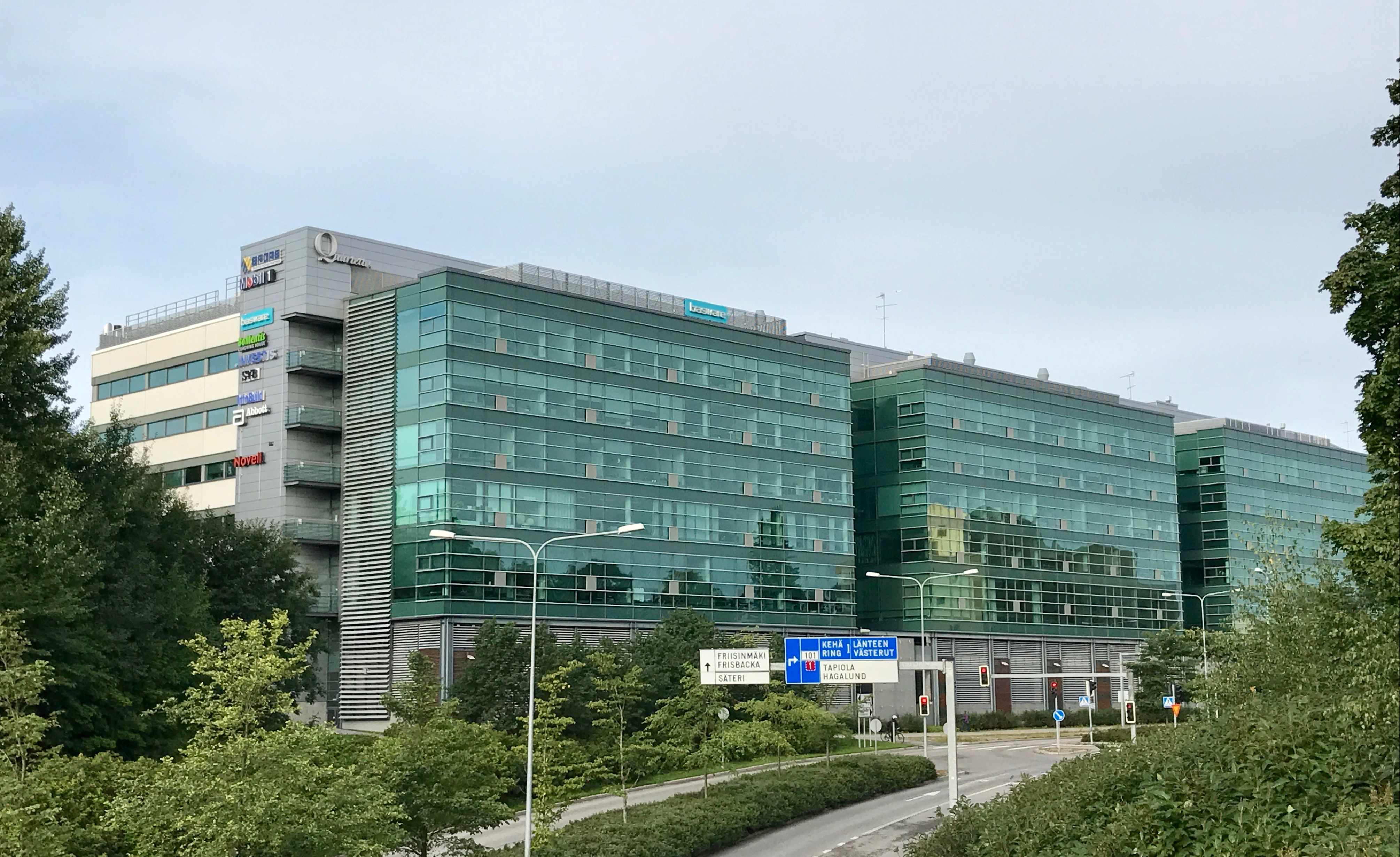 Quartetto Business Parkin toimistorakennuksia Espoon Leppävaarassa.